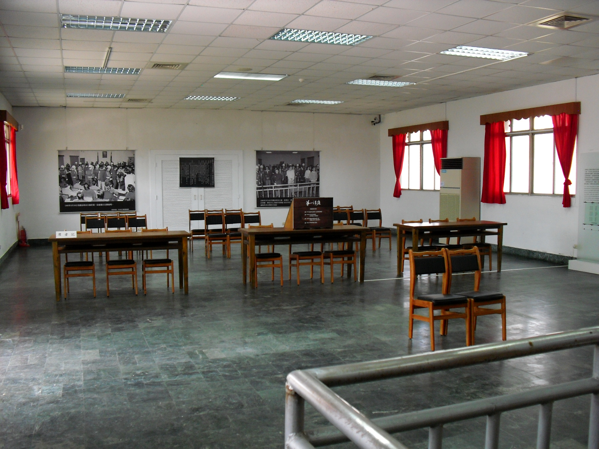 Bân-lâm-gú: 警總軍法處第一法庭內底